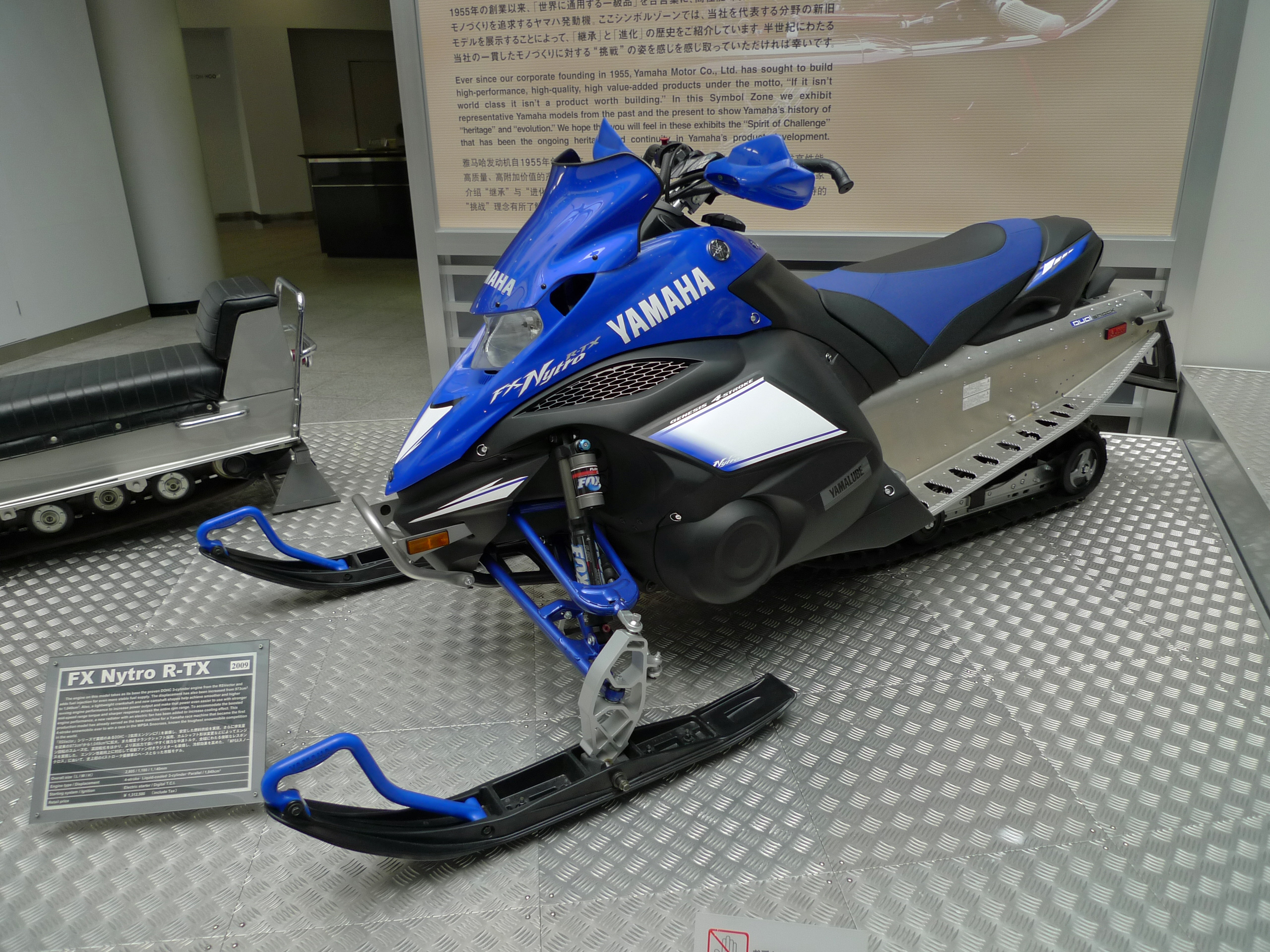 YAMAHA FX Nyutro R-TX 2009、ヤマハコミュニケーションプラザにて撮影